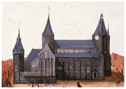 Illustration ancienne de la Collégiale de Soignies au début du XVIIe siècle.